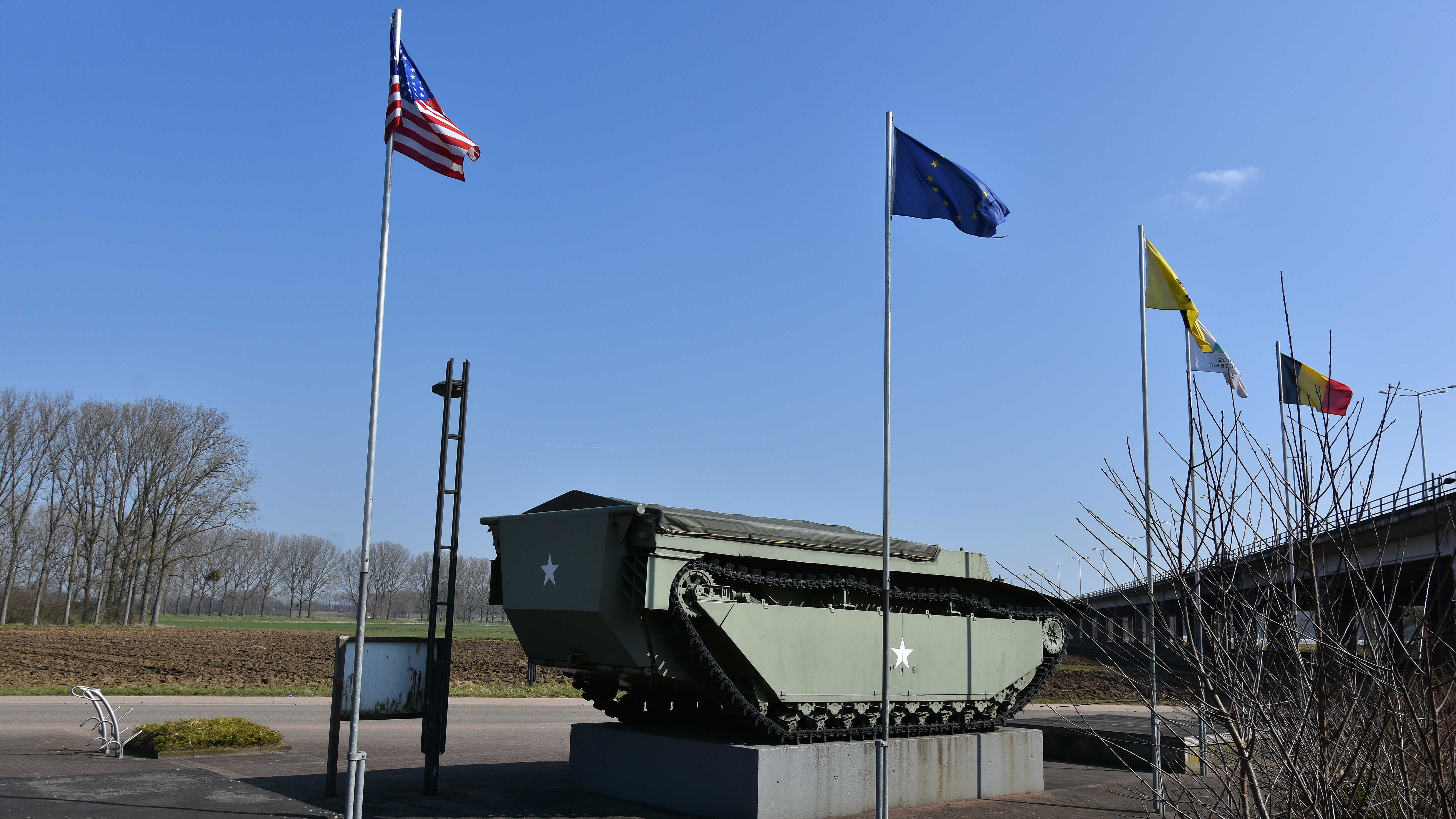 Buffalo Mark IV te Kotem, België